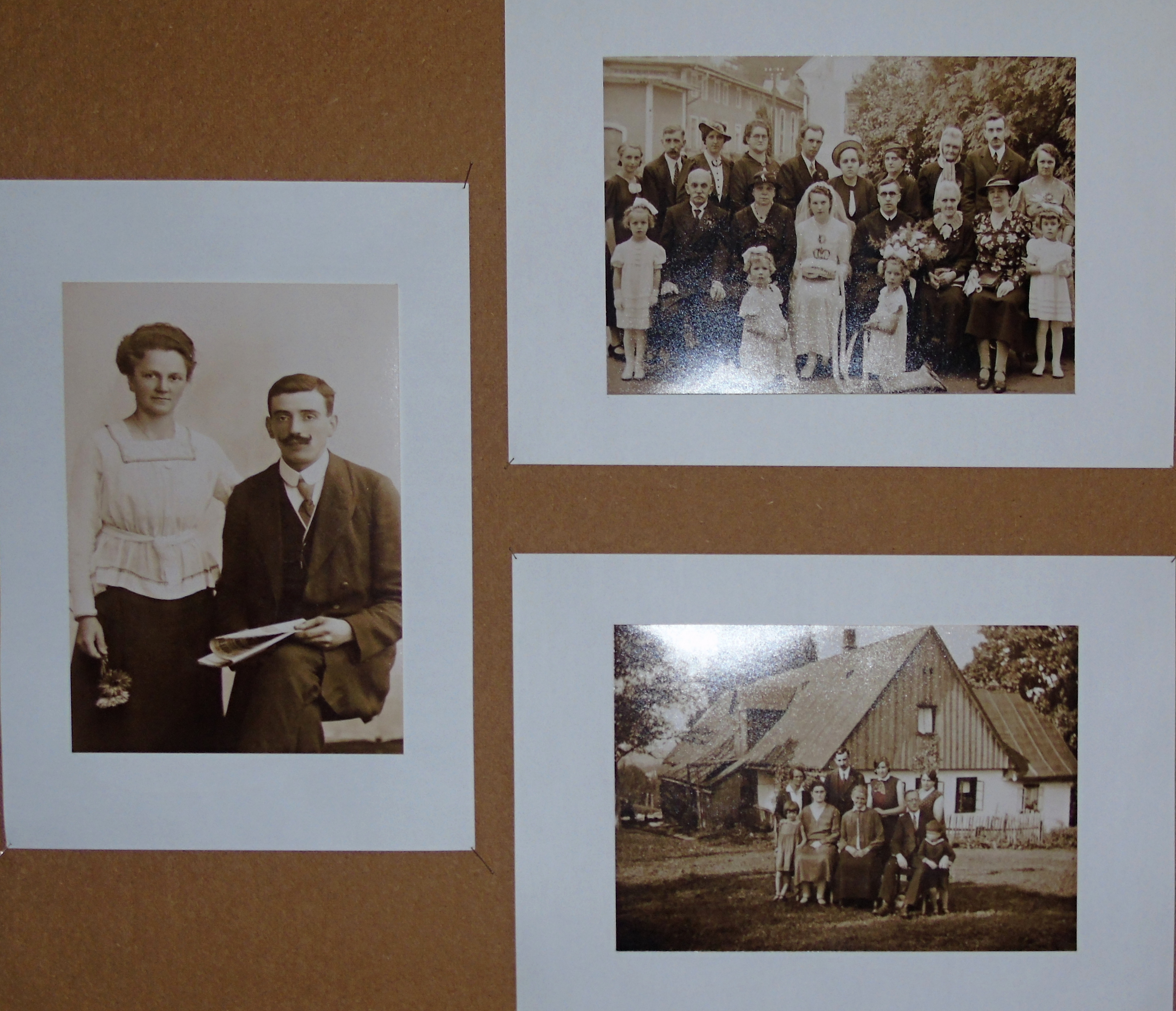 Foto Josefa Utze.